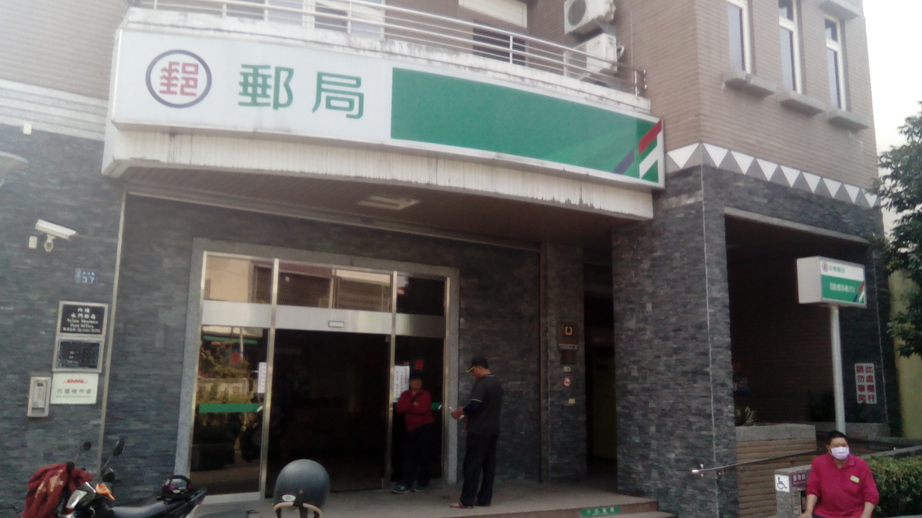 中華郵政內埔水門分局